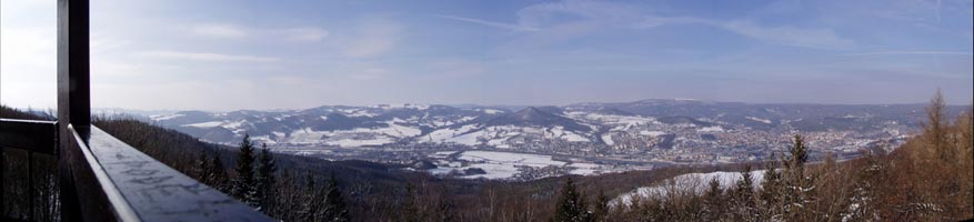 Velky Chlum u Decina - vyhled